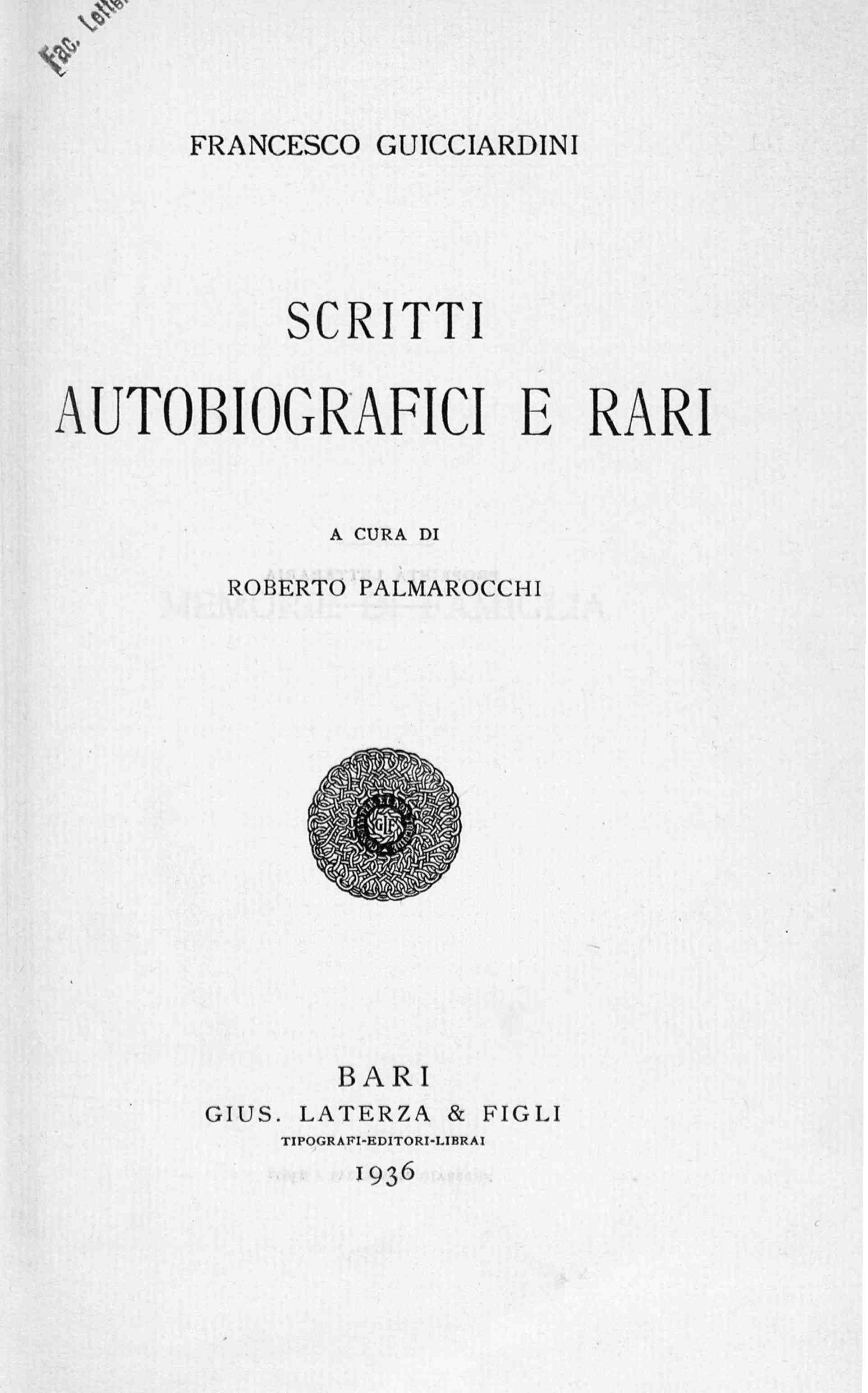 9: Scritti autobiografici e rari / Francesco Guicciardini ; a cura di Roberto Palmarocchi. - Bari : G. Laterza e Figli, 1936. - 414 p. ; 22 cm. - (Scrittori d'Italia ; 156) . Frontespizio